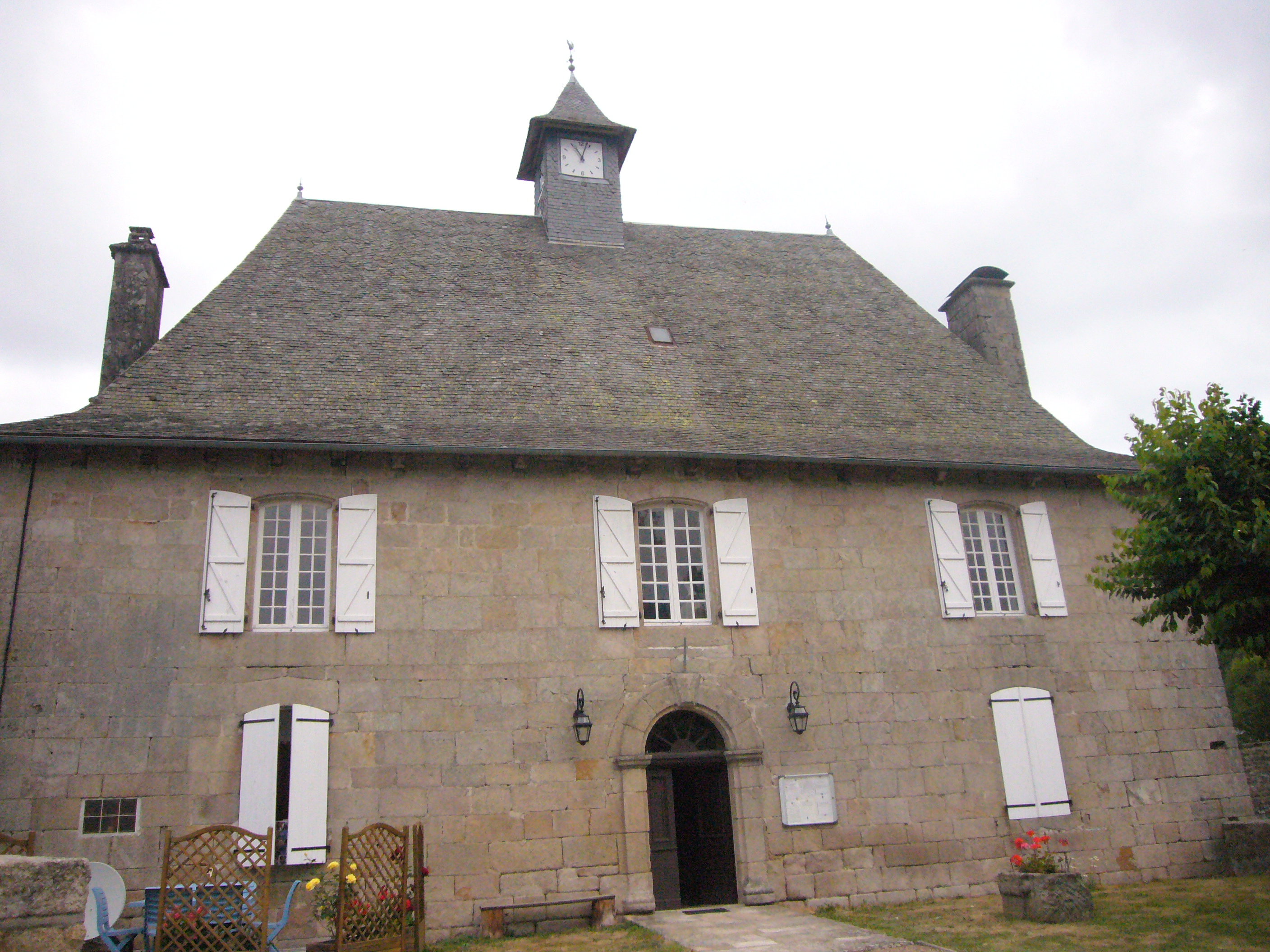 La mairie de Chaumeil (Corrèze, France)